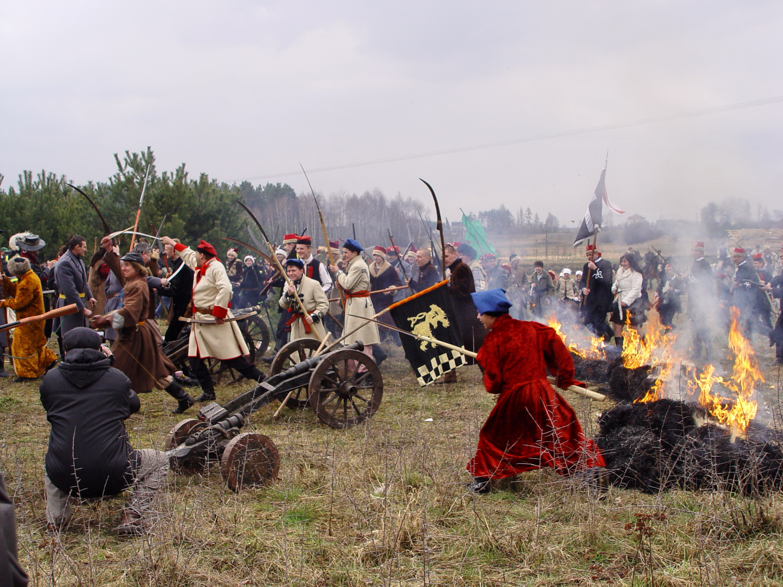 Rekonstrukcja słynnej bitwy powstania styczniowego z 18 marca 1863r. ;Grochowiska, 29 marca 2008r.(WikiMapia